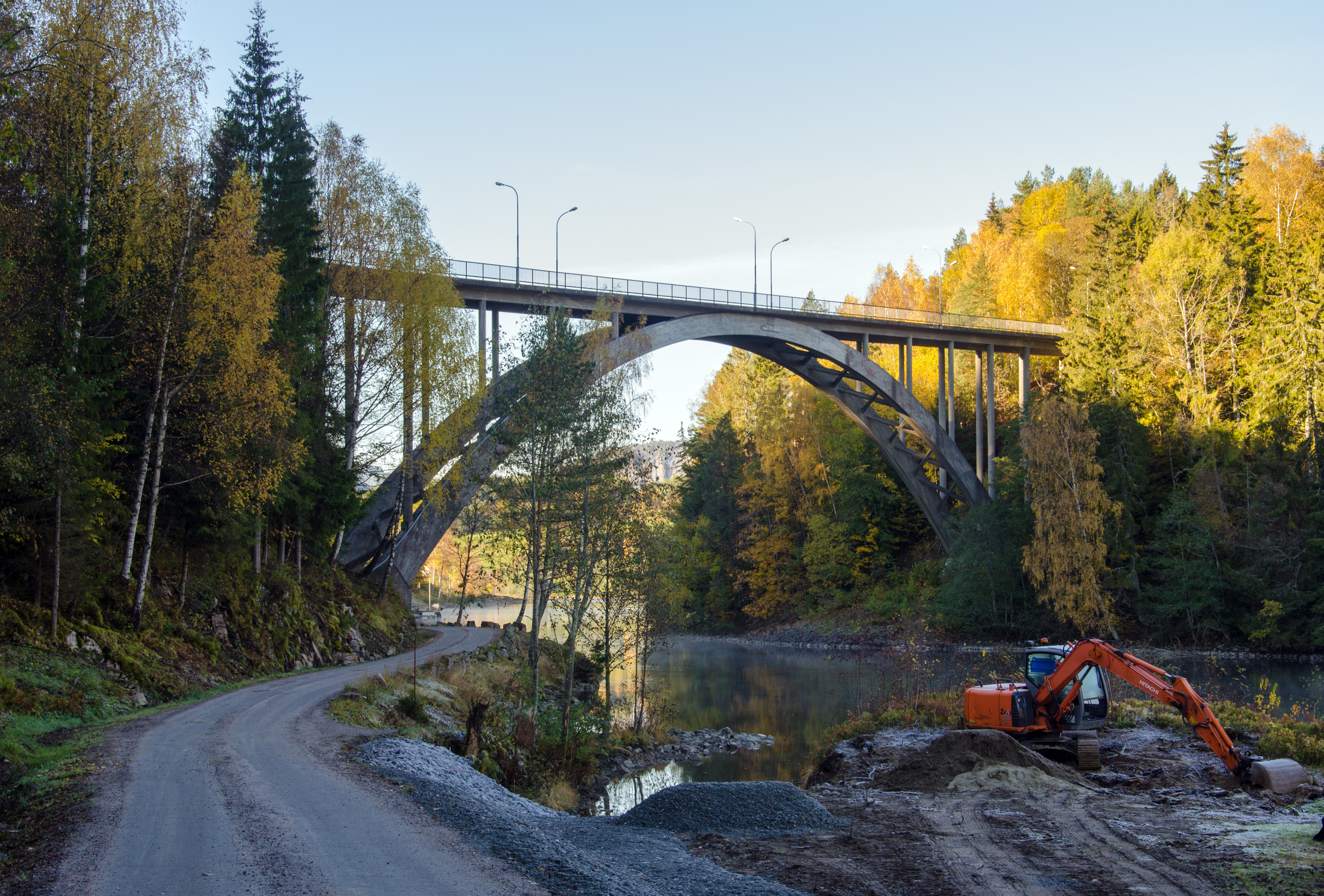 Strengen bru på fylkesvei 107 i Telemark